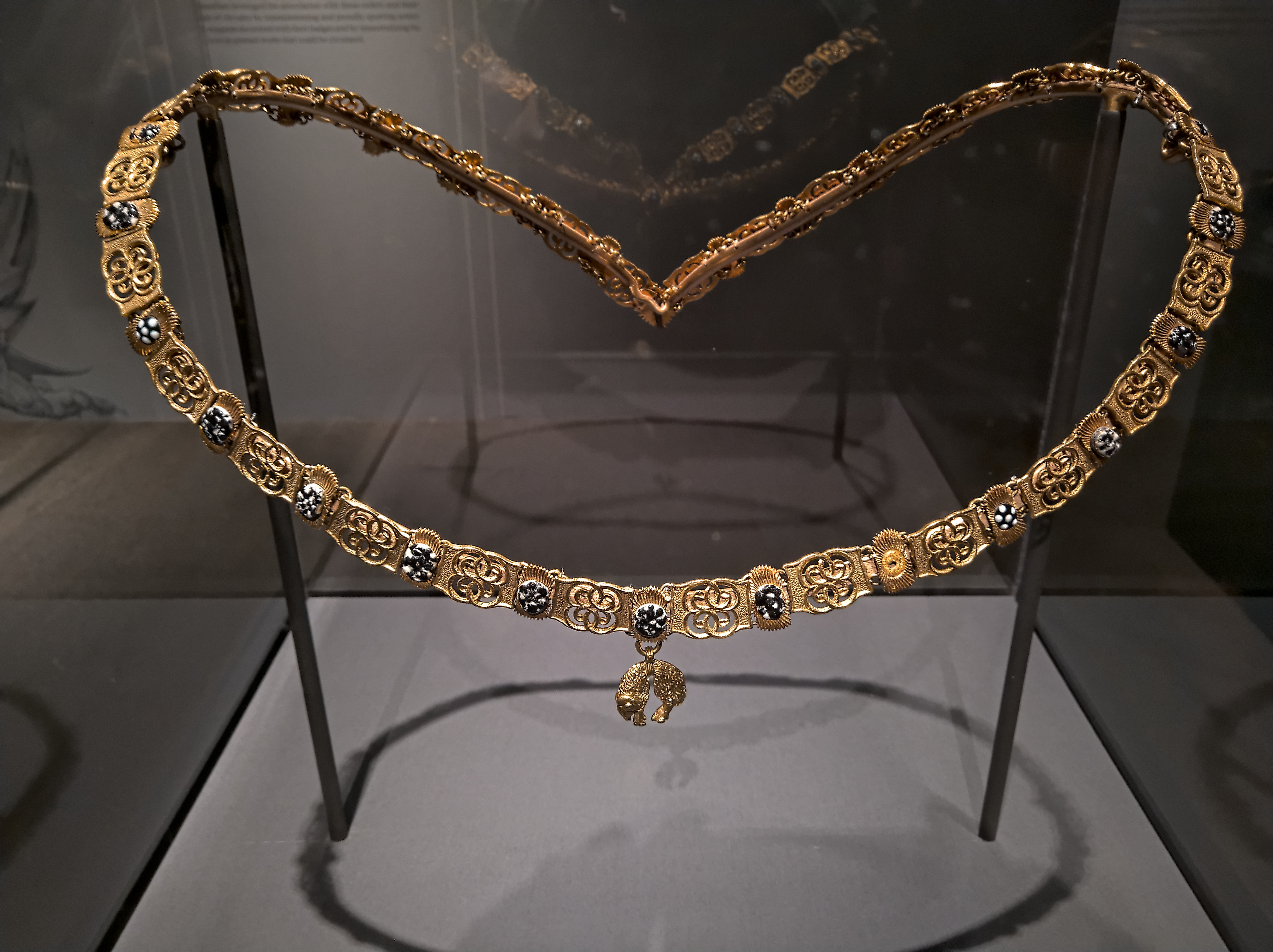 Kolana orderowa orderu Złotego Runa, przełom XV i XVI wieku.